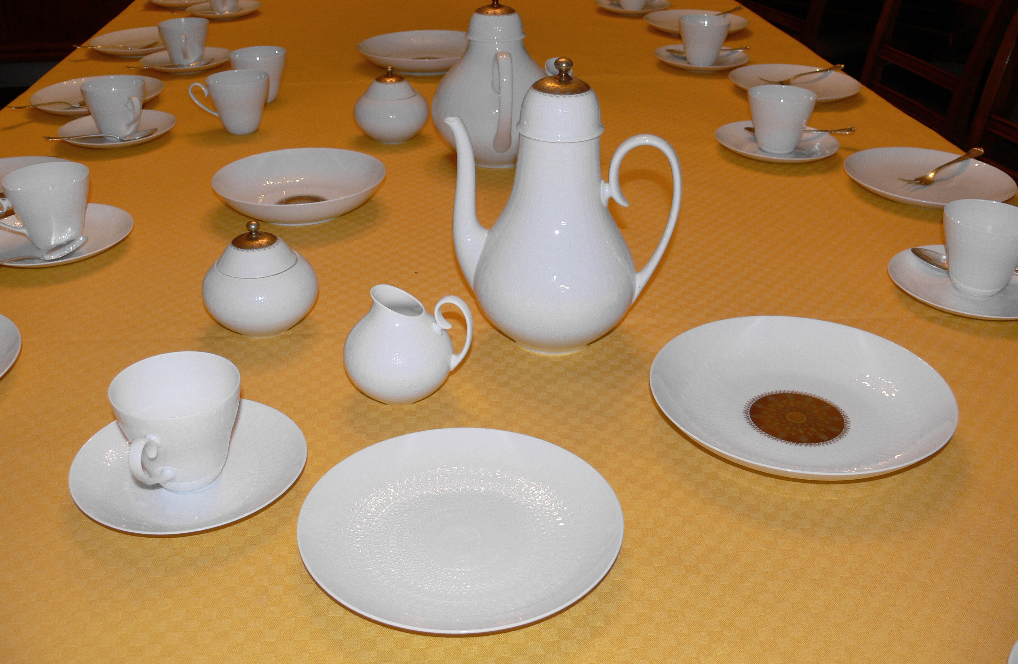 Kaffeeservice, Rosenthal-Porzellan, Serie "Romanze", Design: Bjørn Wiinblad